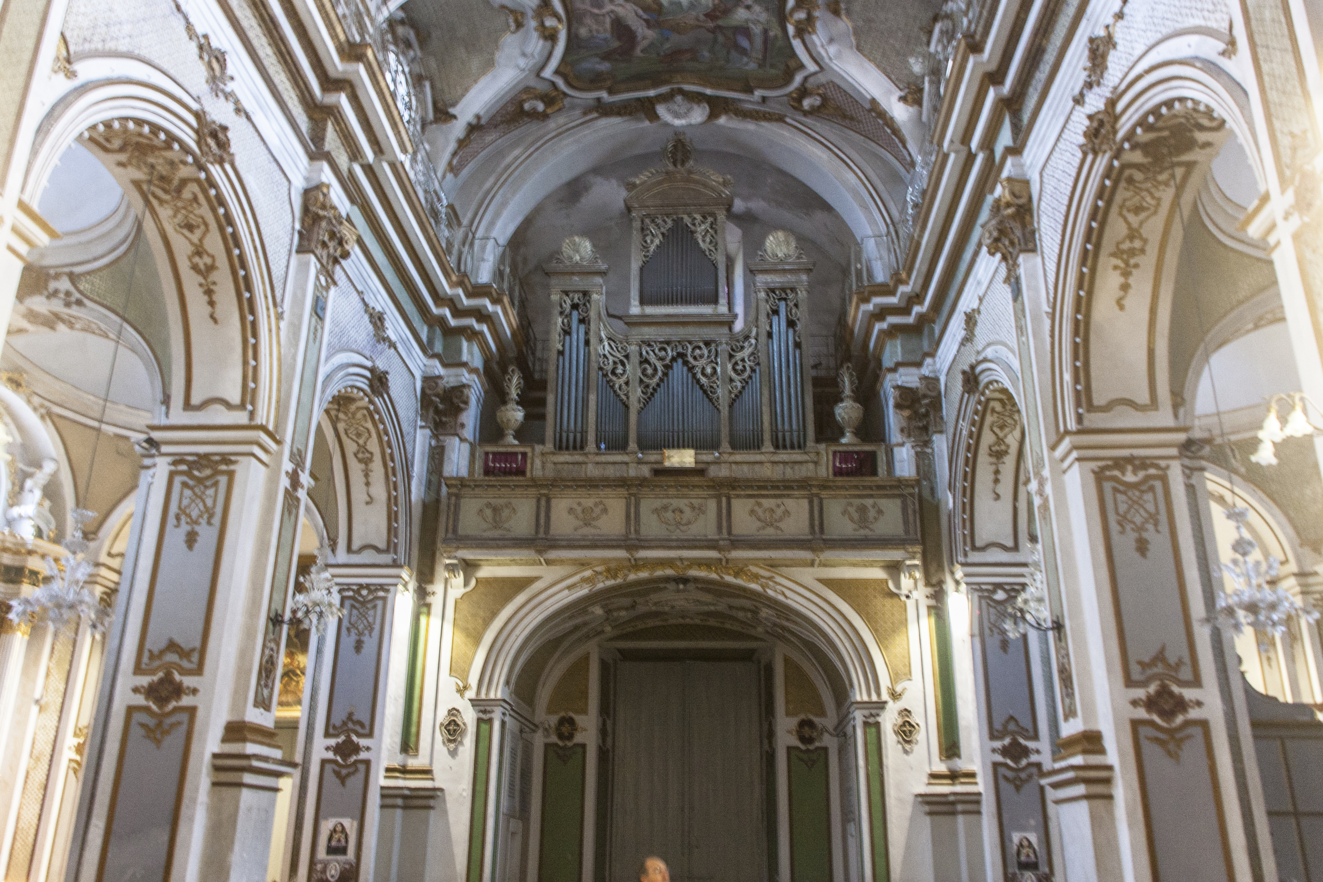 Basilica di Santa Maria Maggiore (interno)